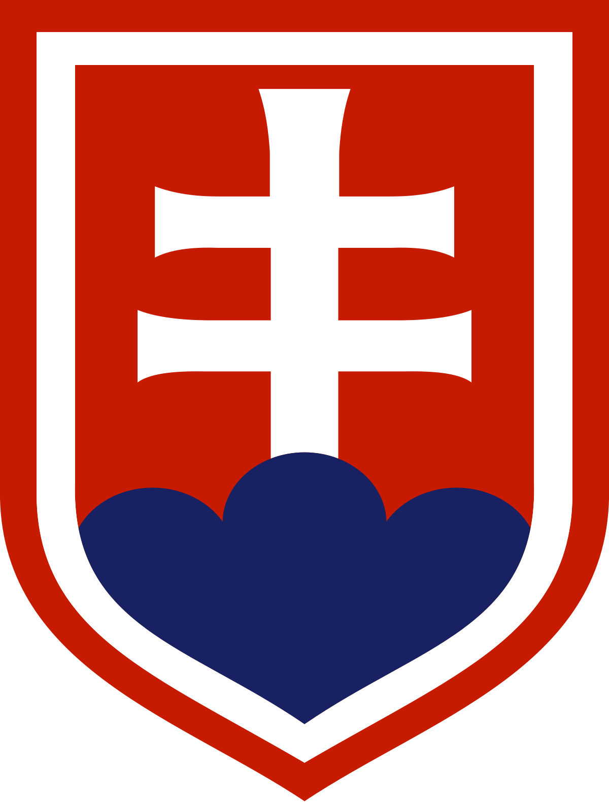 Slovakia national ice hockey symbol